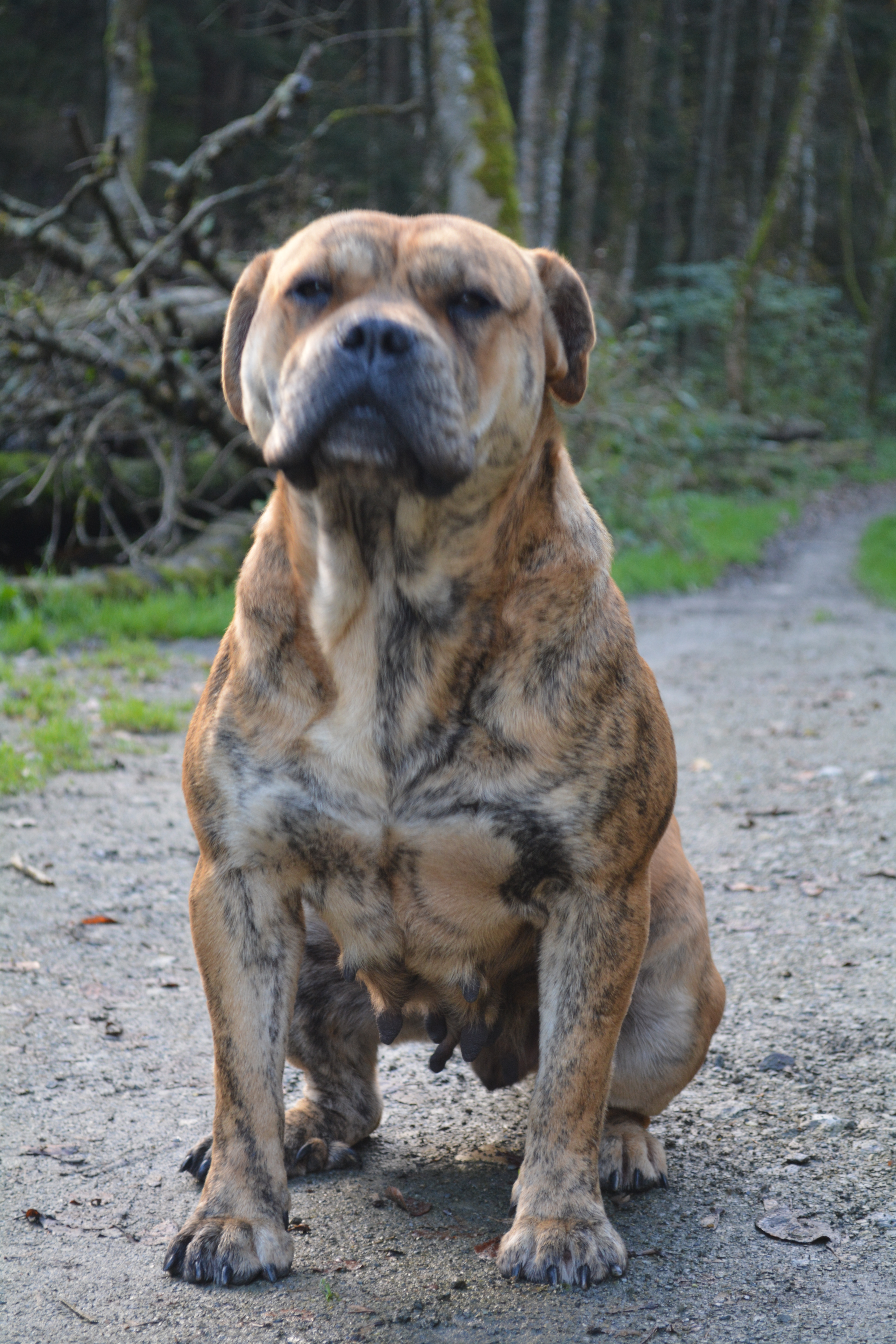 voici HELSI dogue de majorque bringée de 2 ans sur la photo